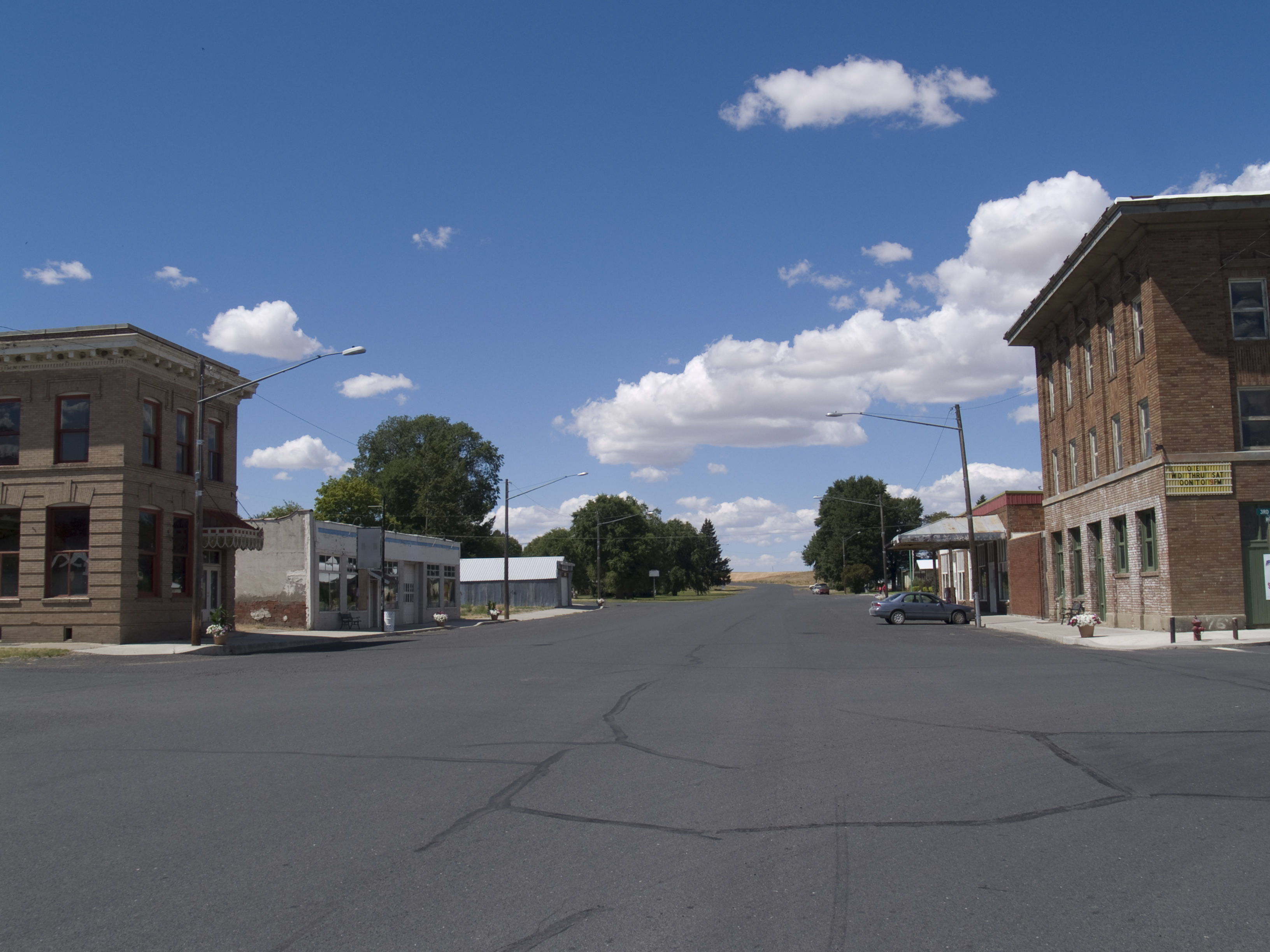 Almira, Washington